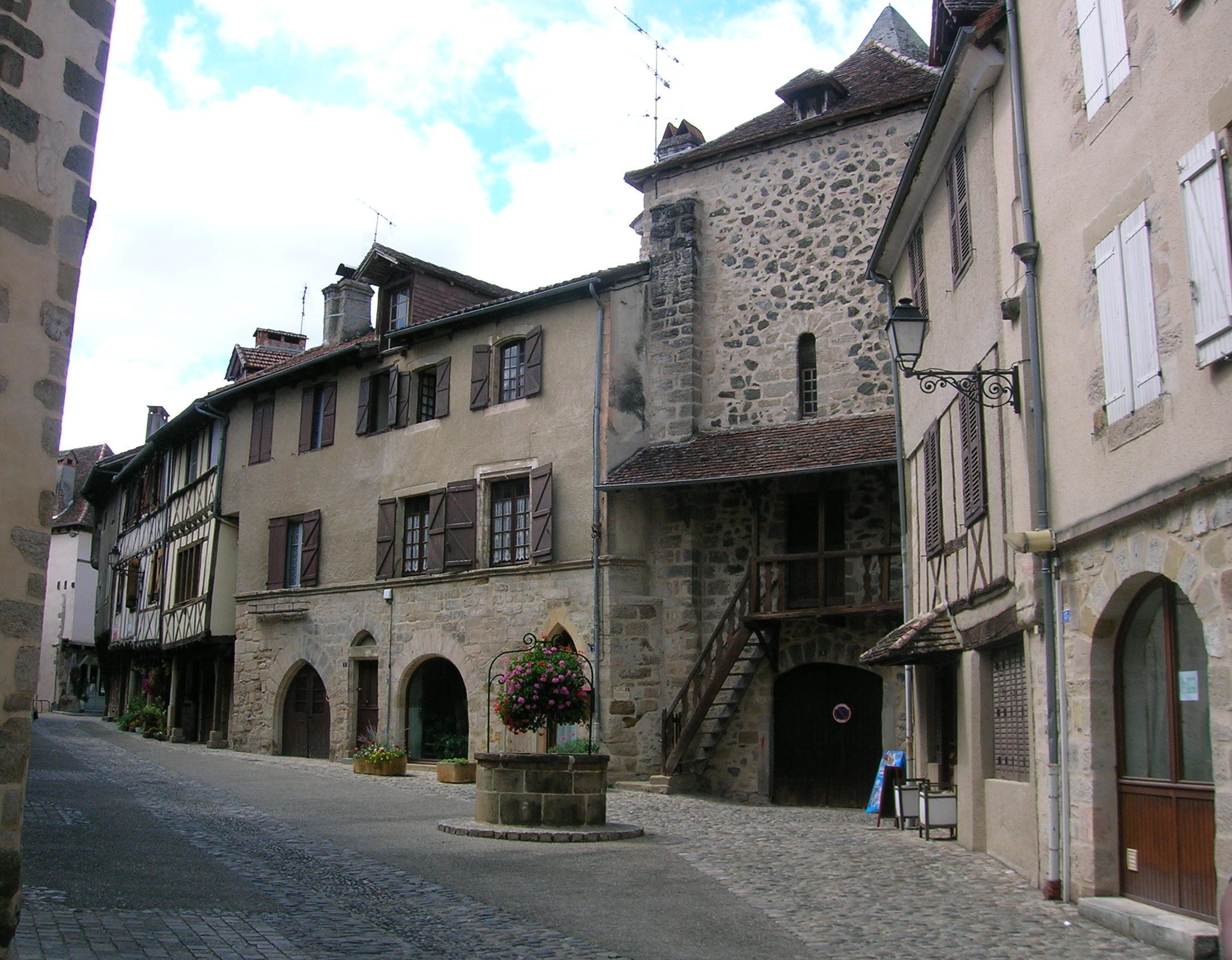 Beaulieu-sur-Dordogne